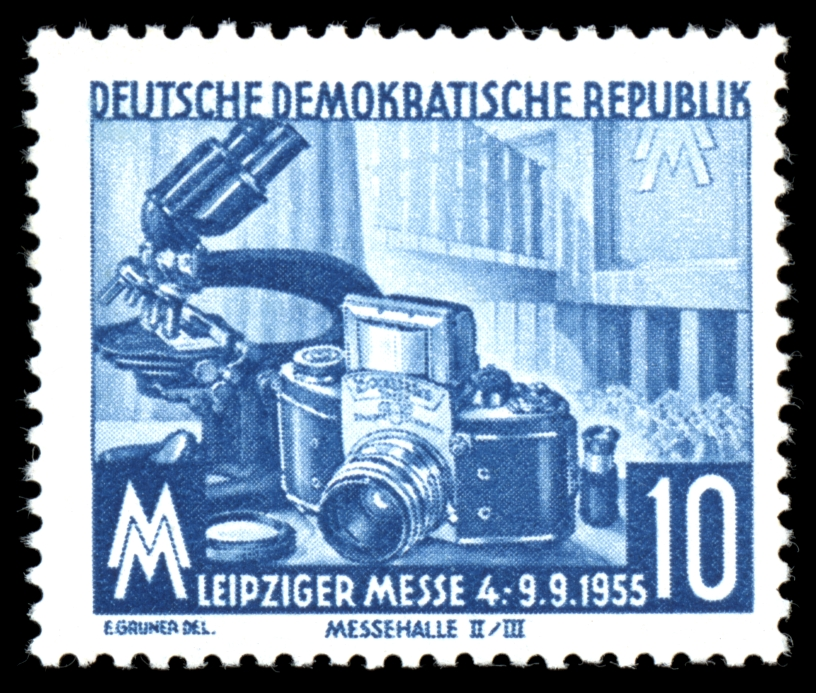 Information: Ausgabepreis: Pfennig First Day of Issue / Erstausgabetag: Auflage: Entwurf: Druckverfahren: Michel-Katalog-Nr: Ländercode-MiNr